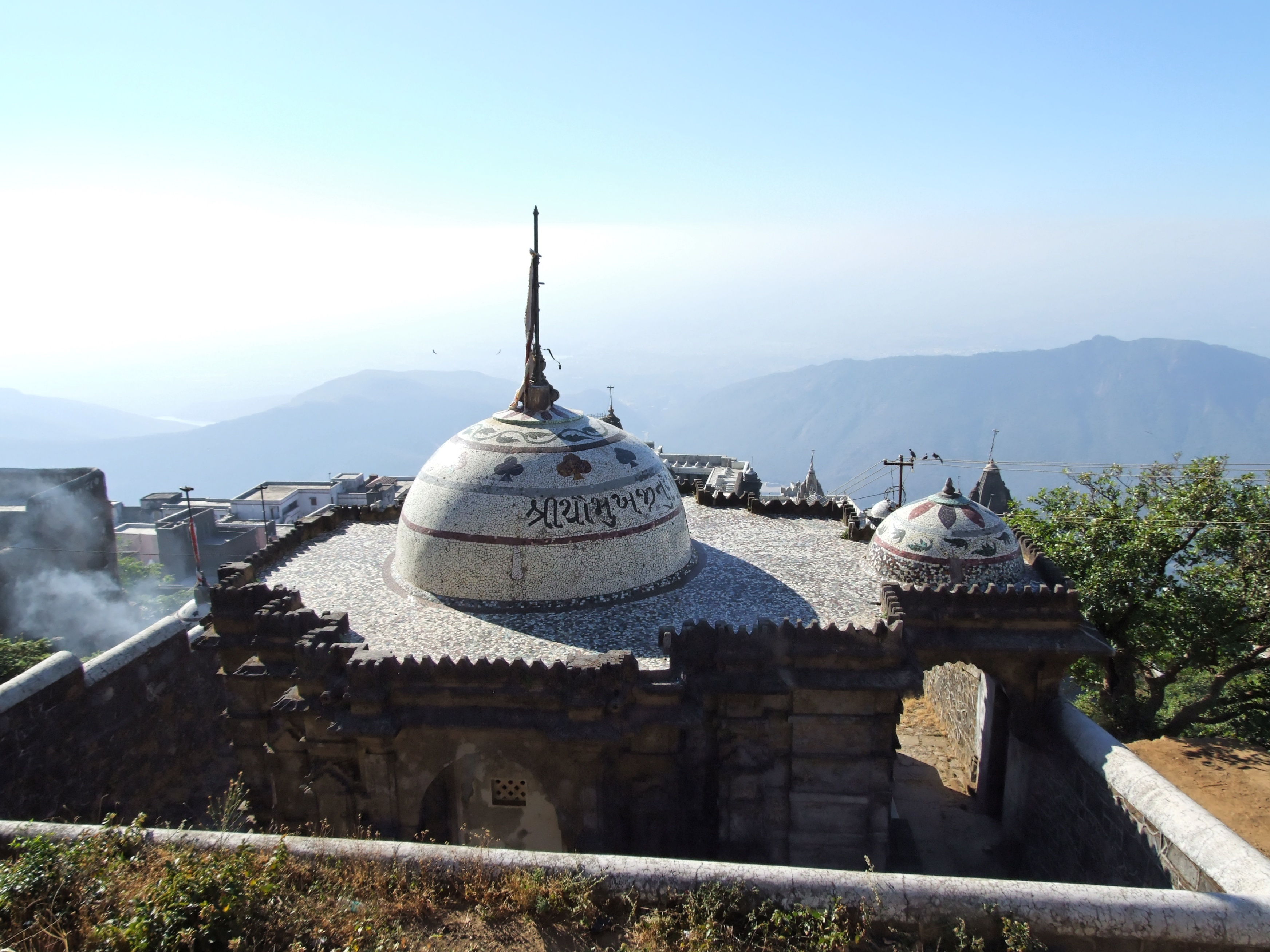 Junagah - Girnar, Gujarat - India